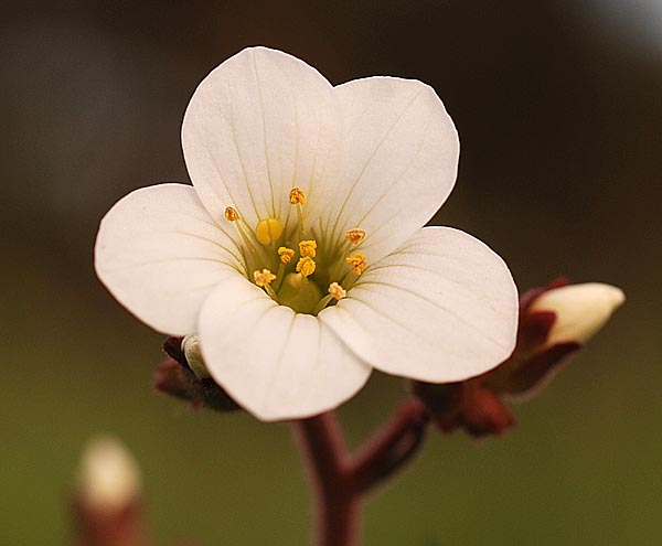 Knöllchen-Steinbrech (Saxifraga granulata)